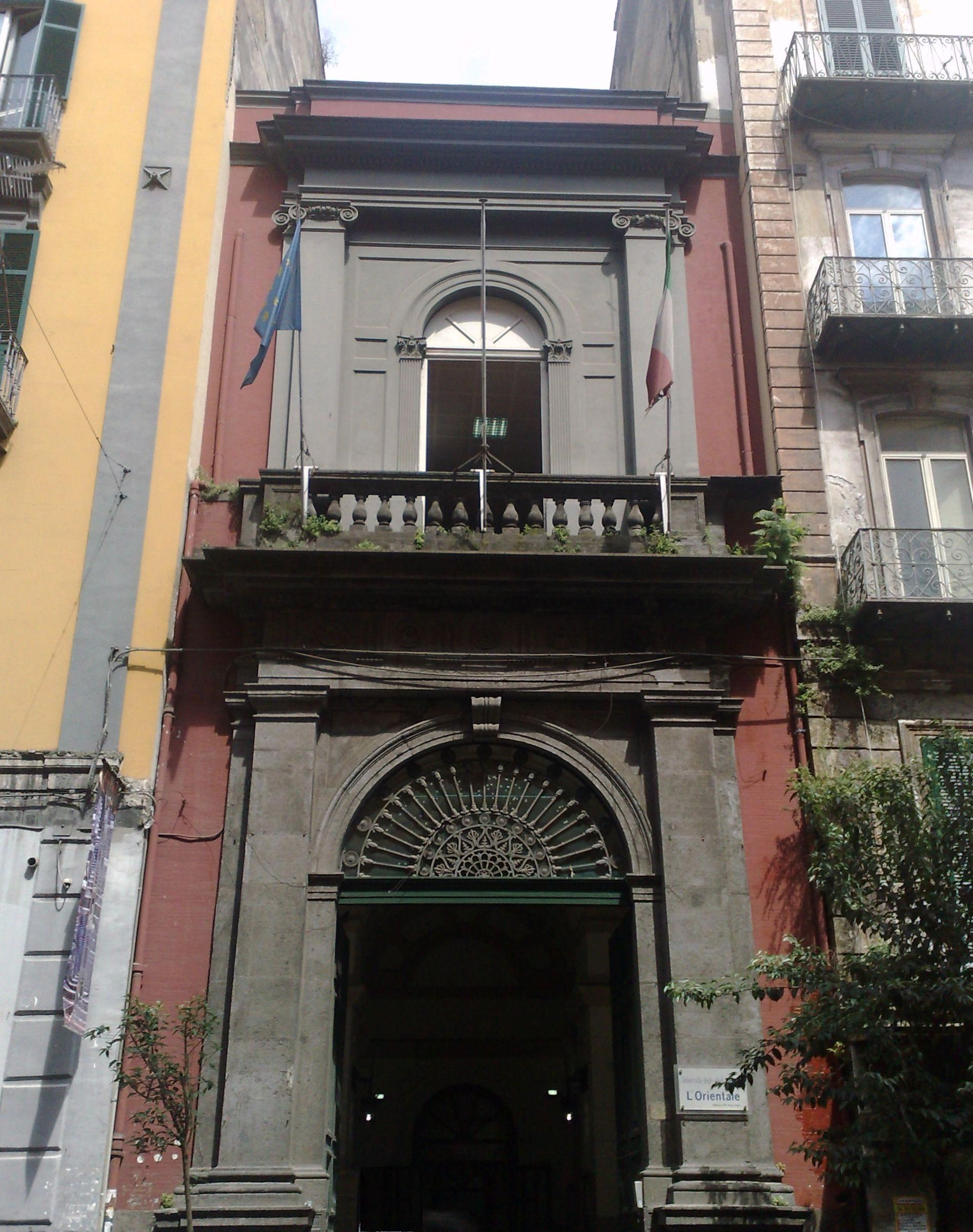 Palazzo Santa Maria Porta Coeli - Sede dell'università L'Orientale di Napoli.